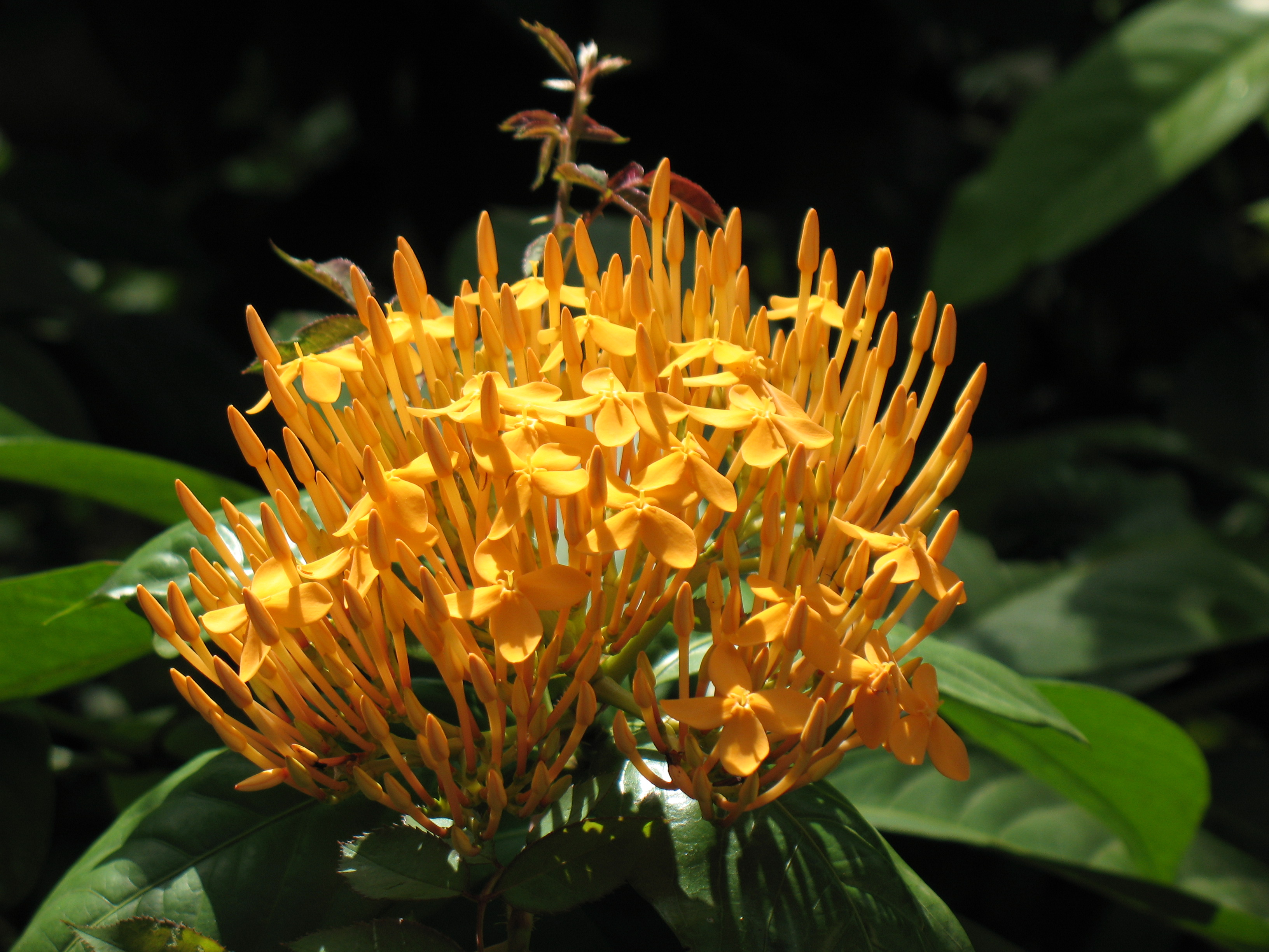 തെച്ചി (മഞ്ഞ)